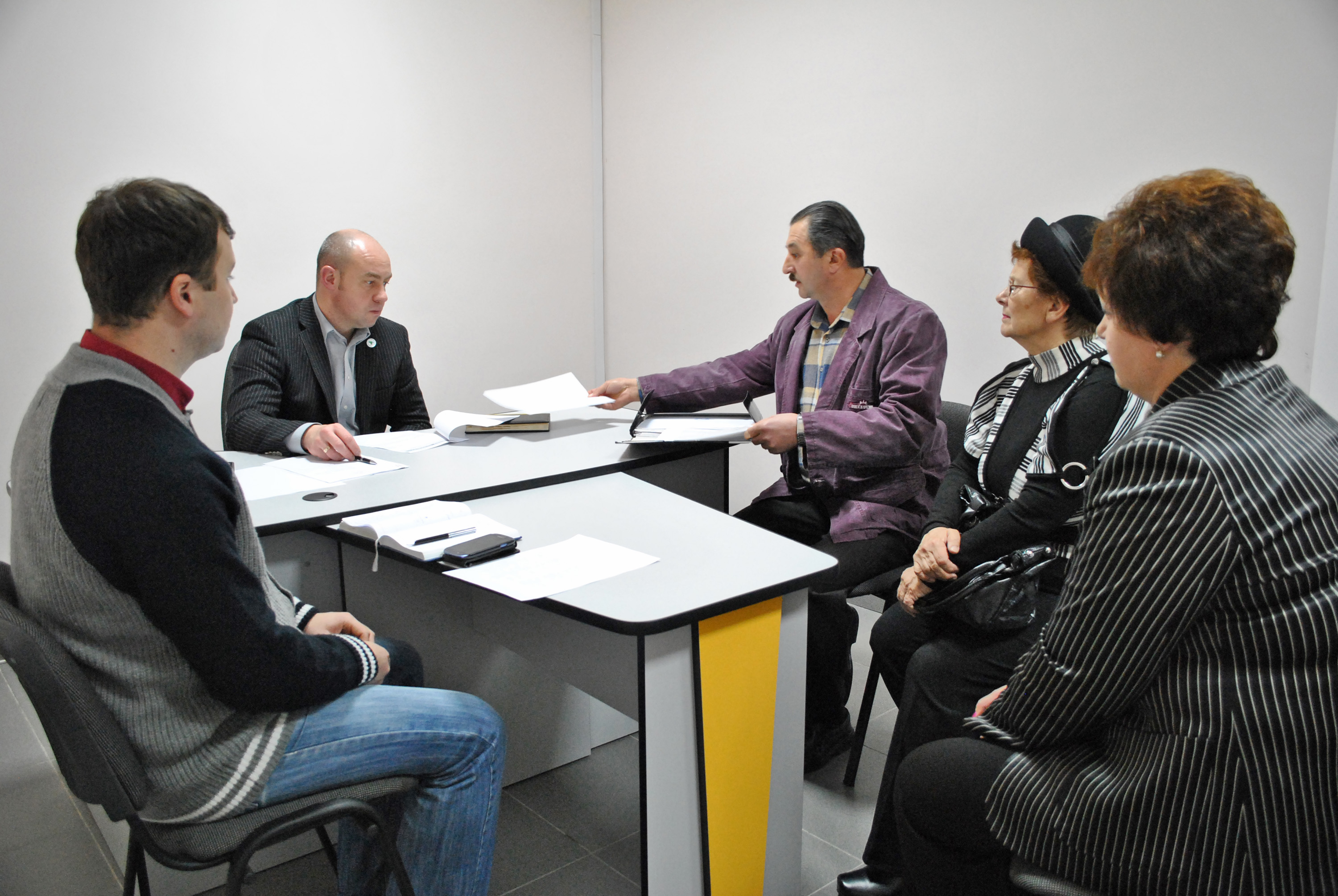 Міський голова Тернополя Сергій Віталійович Надал проводить прийом громадян у Центрі надання адміністративних послуг (ЦНАП) на вул. Князя Острозького, 6.